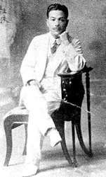 Kim Seong-soo 1920, Founder Dong Ah-Ilbo